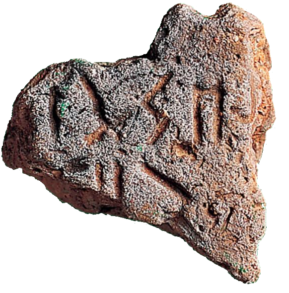 Tabliczka nr. 2